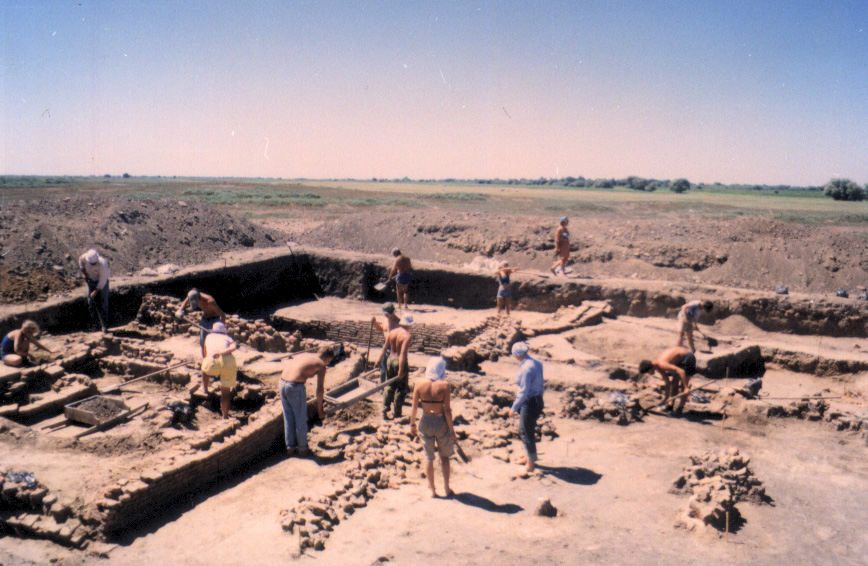 Самосдельское городище 2002 раскоп №1